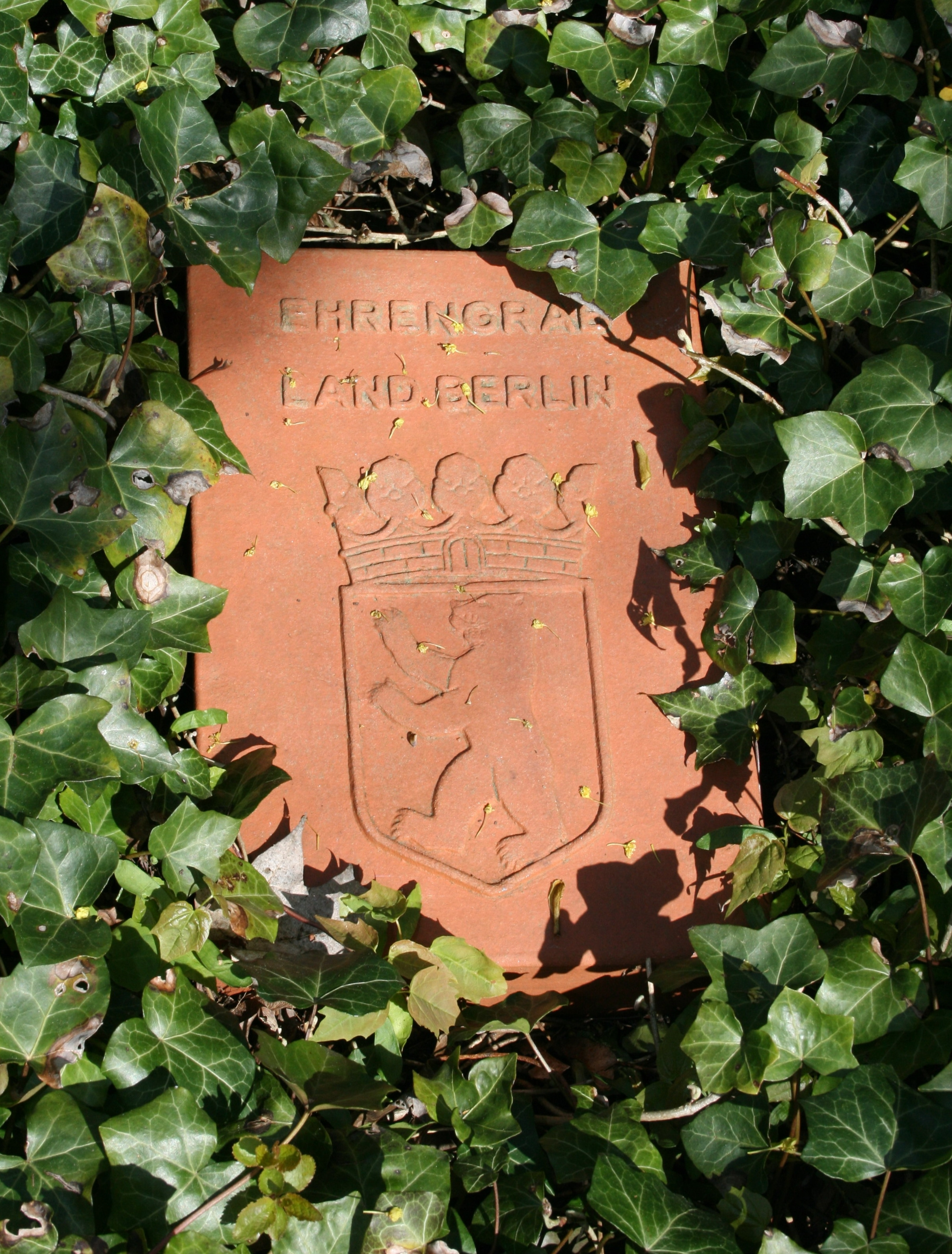 Stein zur Kennzeichnung eines Ehrengrabes des Landes Berlin